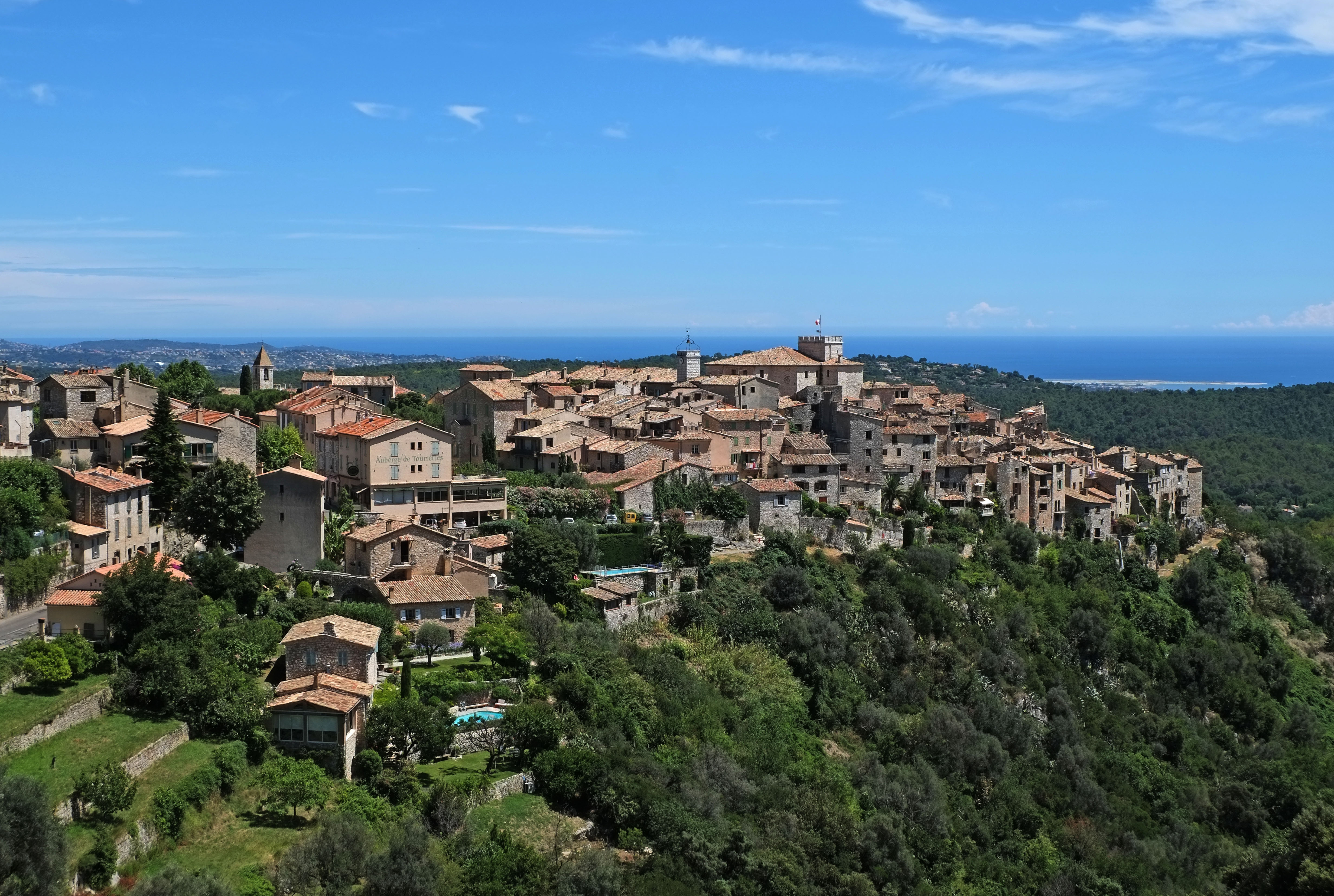 Vue du village de Tourrettes-sur-Loup depuis la route des Quenières